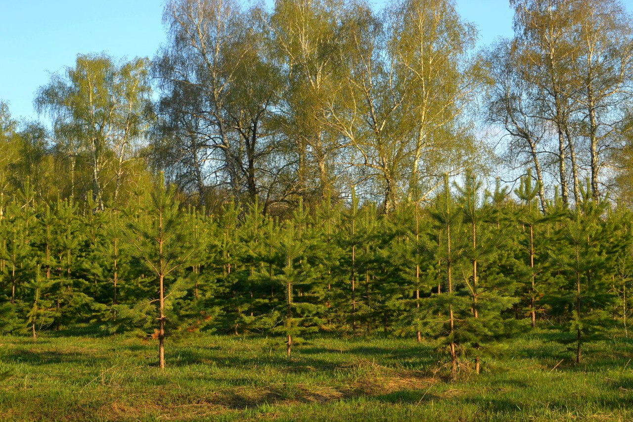 Шульган-Таш заповедник: Заповедник находится на западном макросклоне Южного Урала, водоразделе рр. Белая и Нугуш (скальный массив Шульган-Таш). Местонахождение заповедника определяется координатами: 52°90 ’ - 53°10’ с.ш. и 57°00’ - 57°15’ в.д,Бурзянский район, Башкортостан This image is related to the protected area of Russia number 0200105